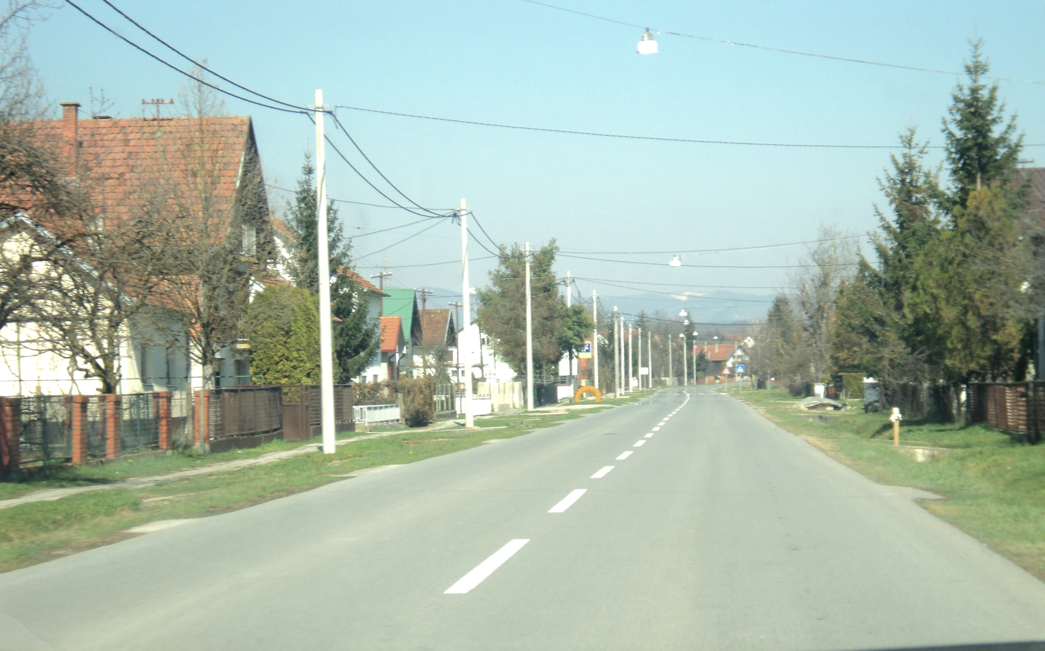 Gradac kod Pleternice